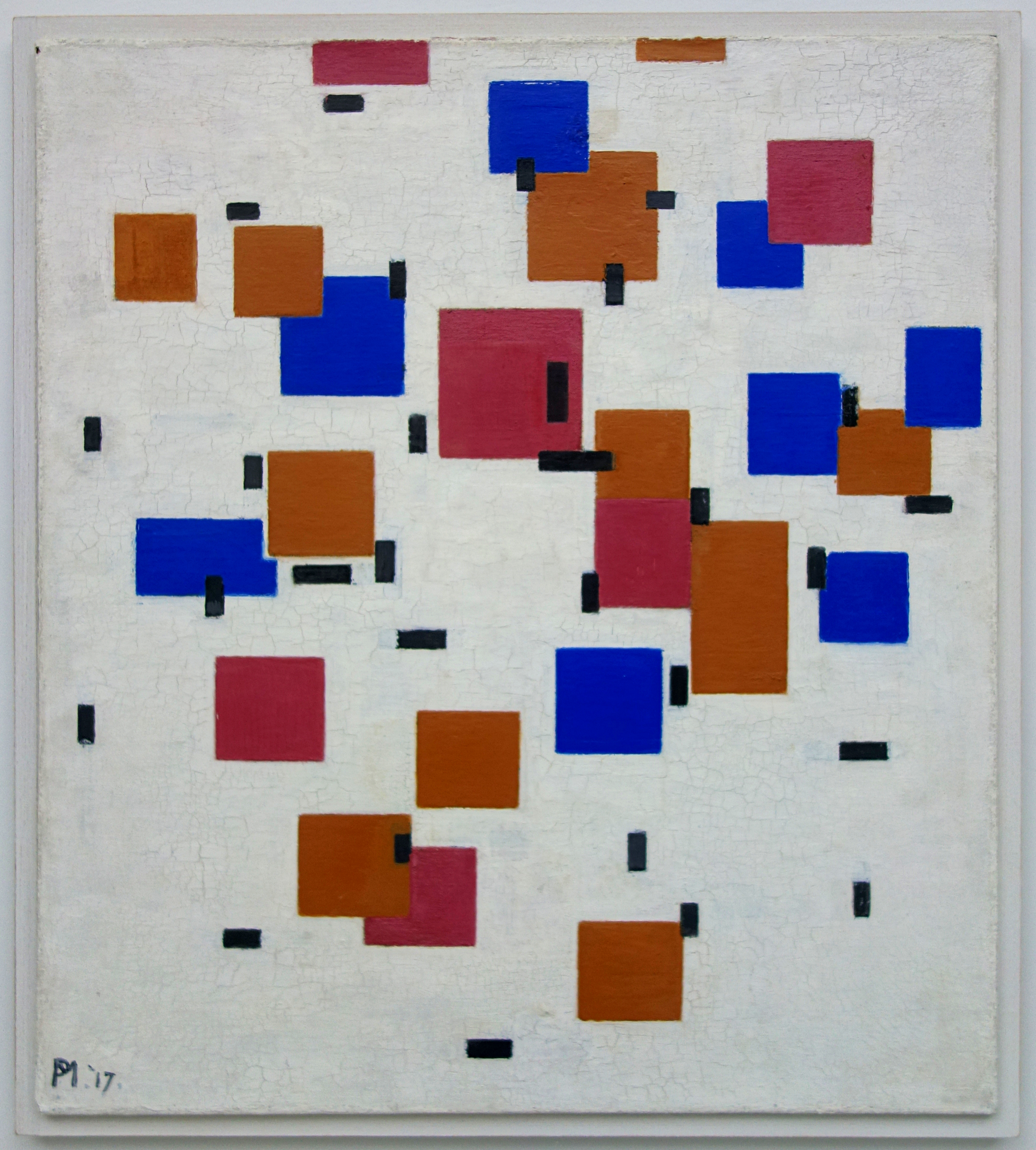 Composition en couleur A